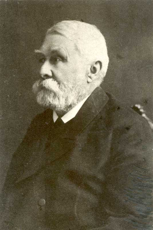 Albert Anmlacher (1847-1939) war ein in Siebenbürgen lebender deutschsprachiger evangelischer Pfarrer und Schriftsteller.